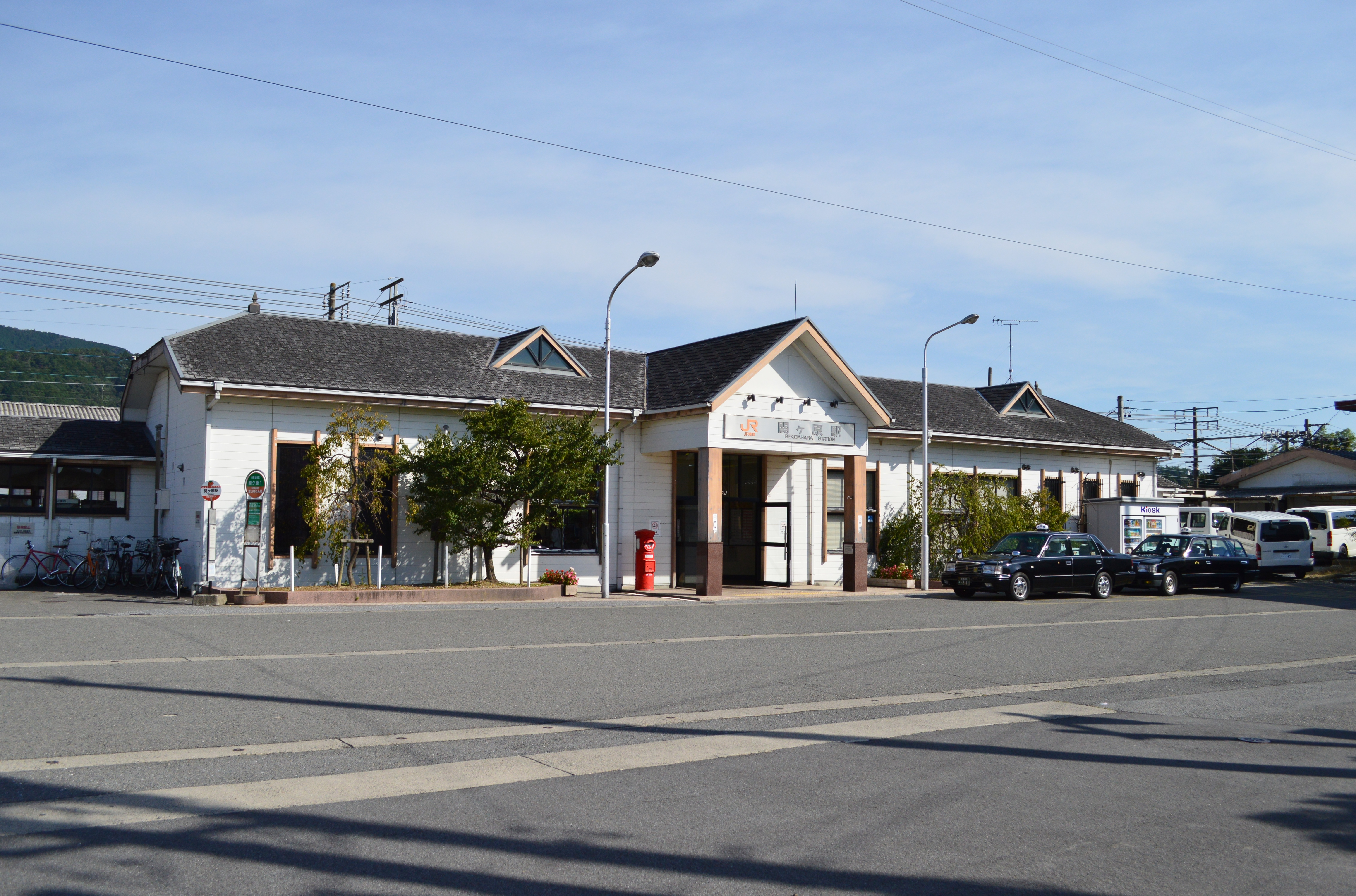 関ケ原駅 駅舎